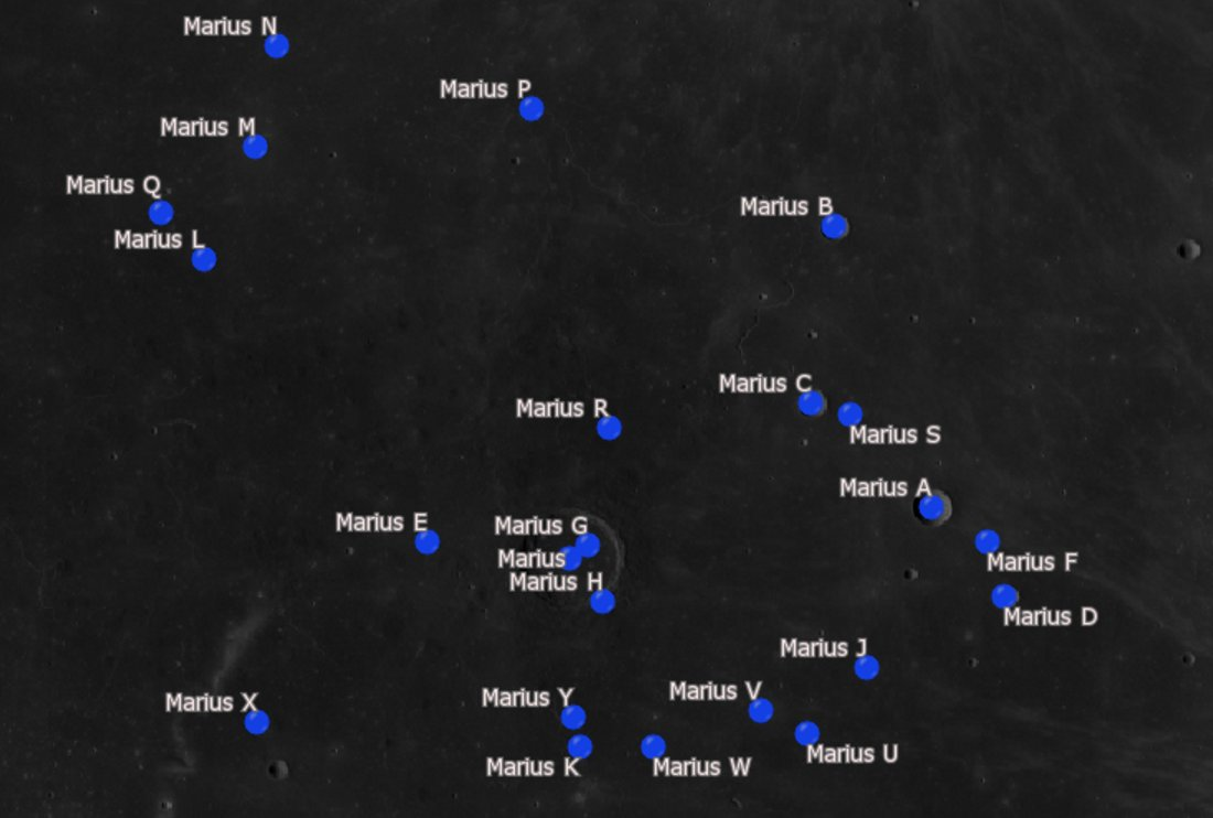 Cráter lunar Marius. Cráteres satélite. (Imagen LRO)